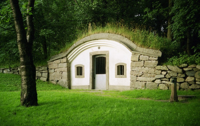 Kallebäcks källa i Göteborg